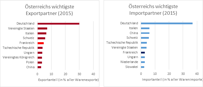 Österreichs wichtigste Handelpartner 2015